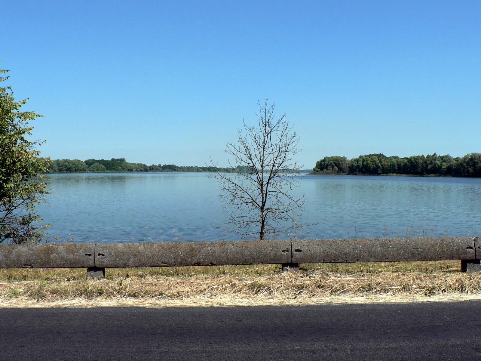 Widok z grobli na Jezioro Pakoskie